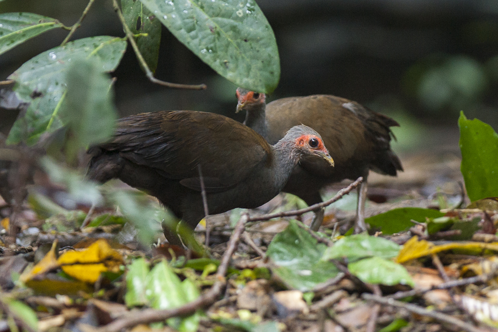 Tabon Scrubfowl - Palawan - Philippines_H8O0594